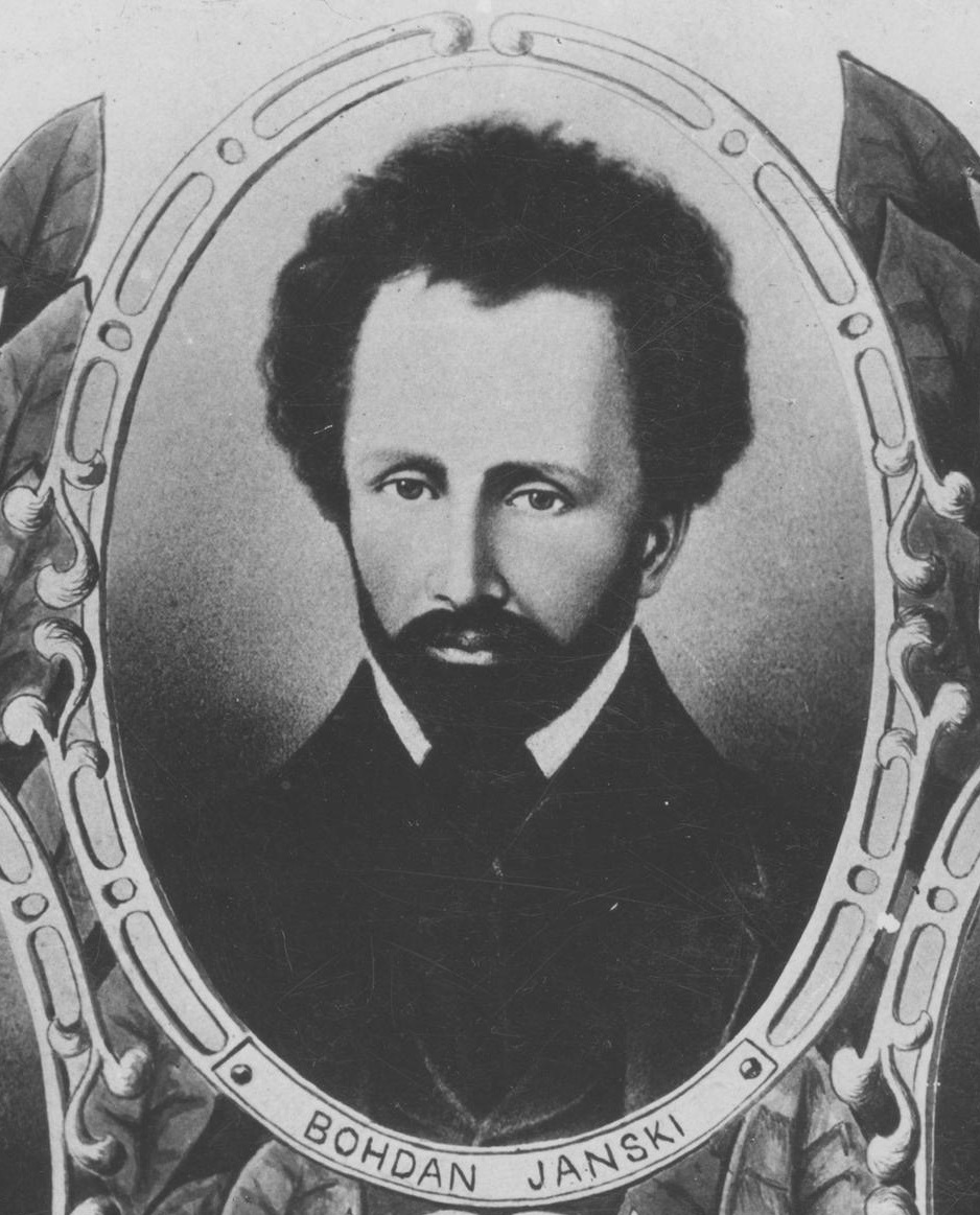 Bohdan Jański